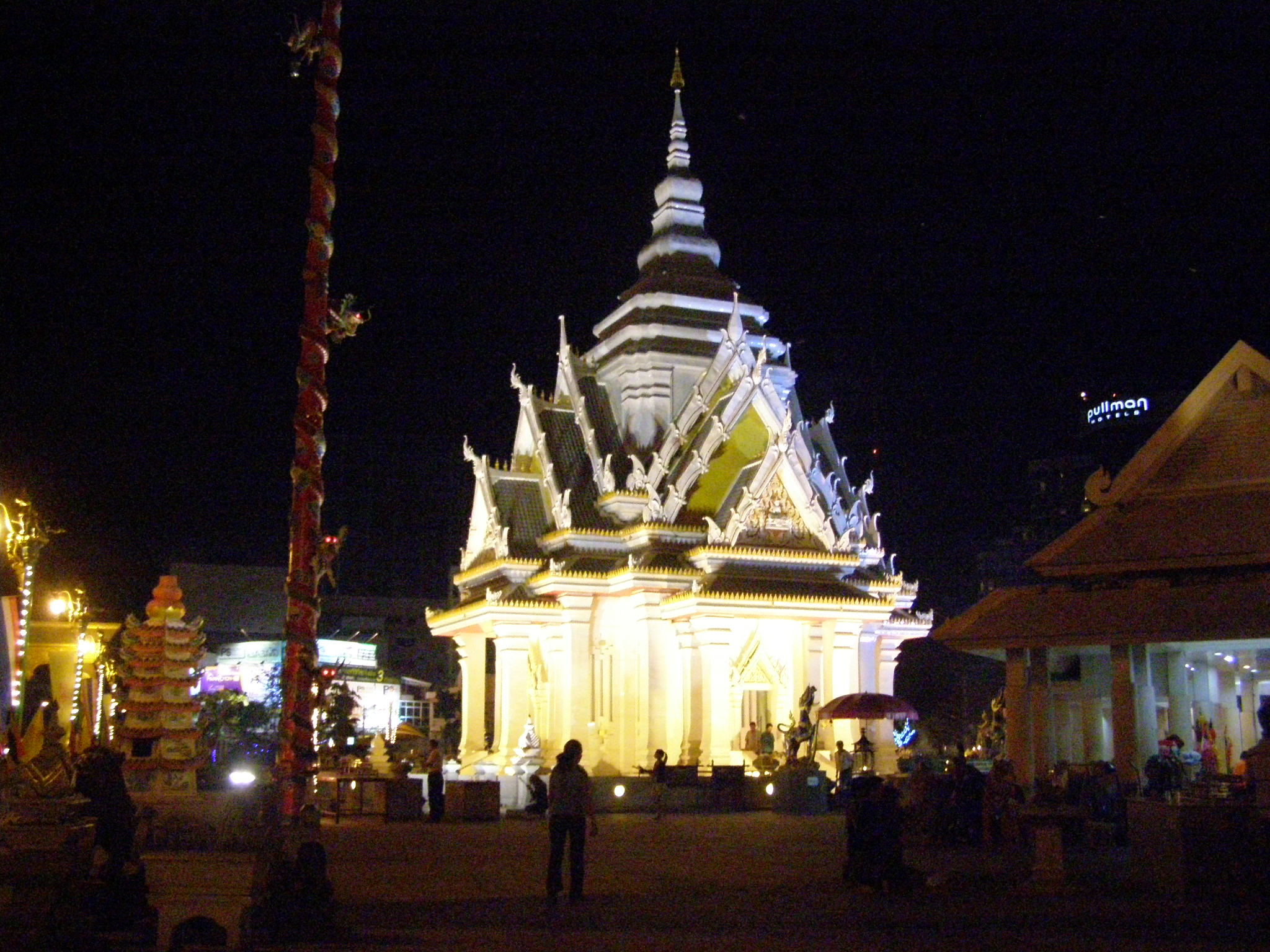 จังหวัดขอนแก่น